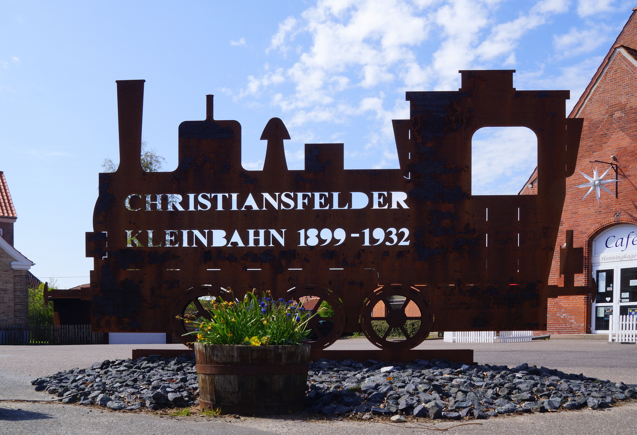 Haderslev-Christiansfeld Kunst aus Stahl zur Erinnerung an die Eisenbahn-Anbindung Haderslev, Jernbanegade/Kongensgade - Foto Wolfgang Pehlemann DSC 3545Dansk: Silhouette stålkunst fra Christiansfeld Haderslev Amts Jernbaner 1899-1932